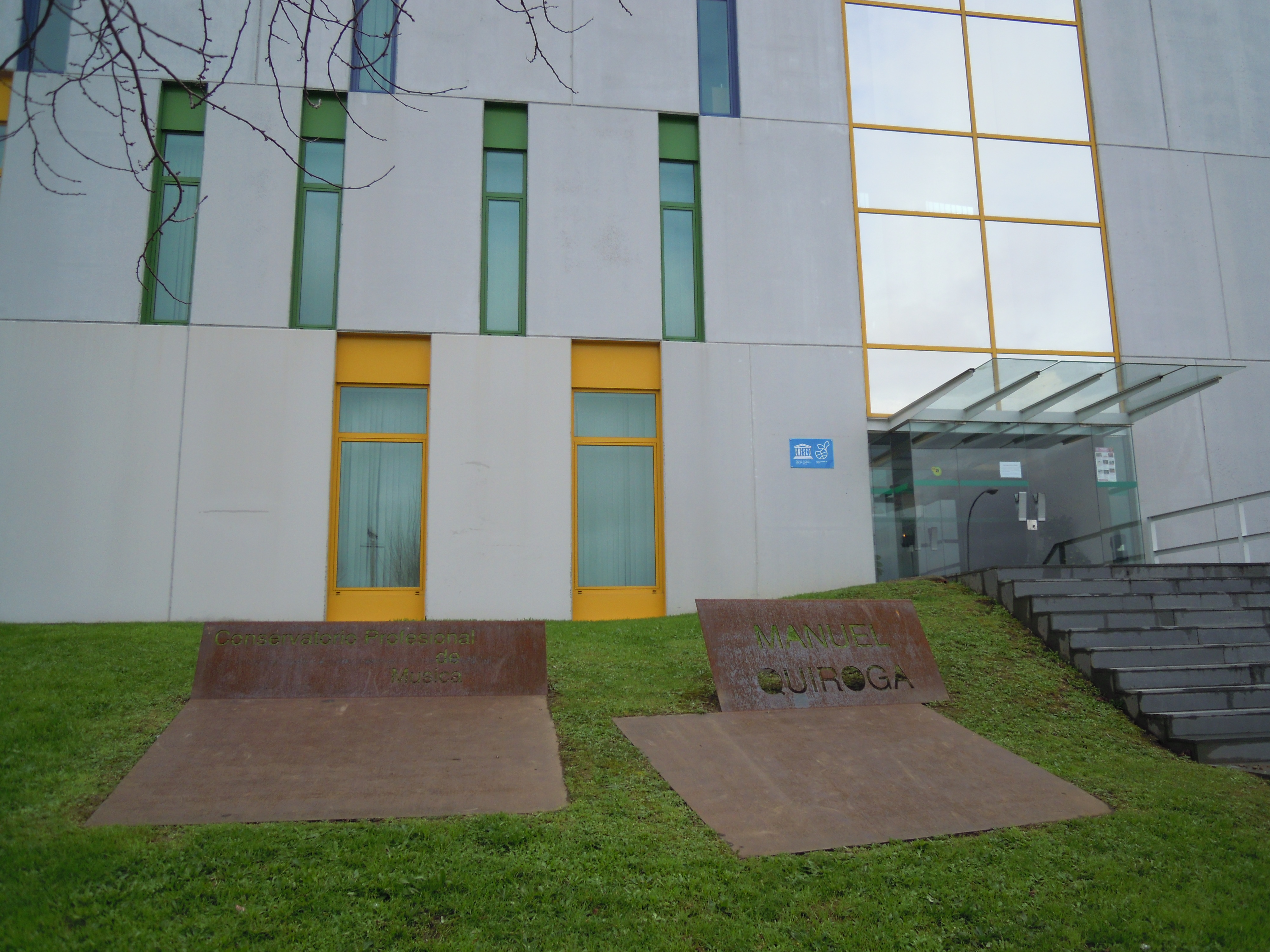 Conservatorio Profesional de Música Manuel Quiroga, en Pontevedra